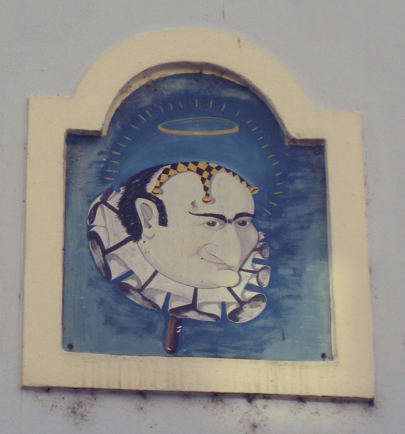 “Portrait” von Sigi Zimmerschied an der Wand seines Hauses in Passau